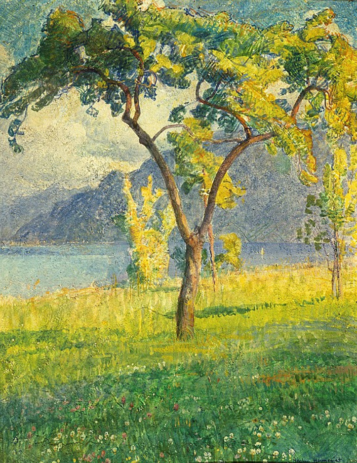 Mon verger